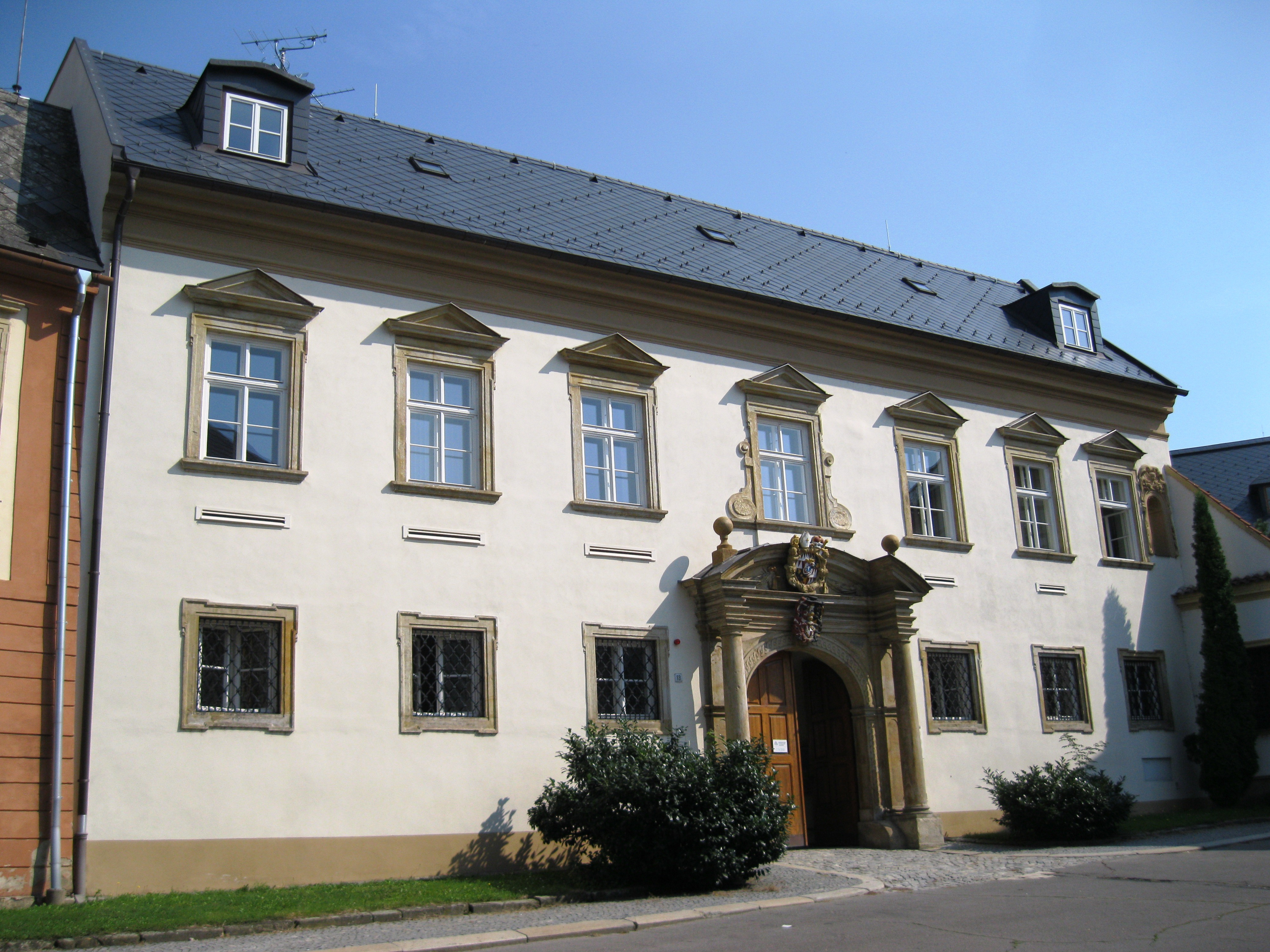 Kanovnický dům (Olomouc), Wurmova 526/13, Olomouc